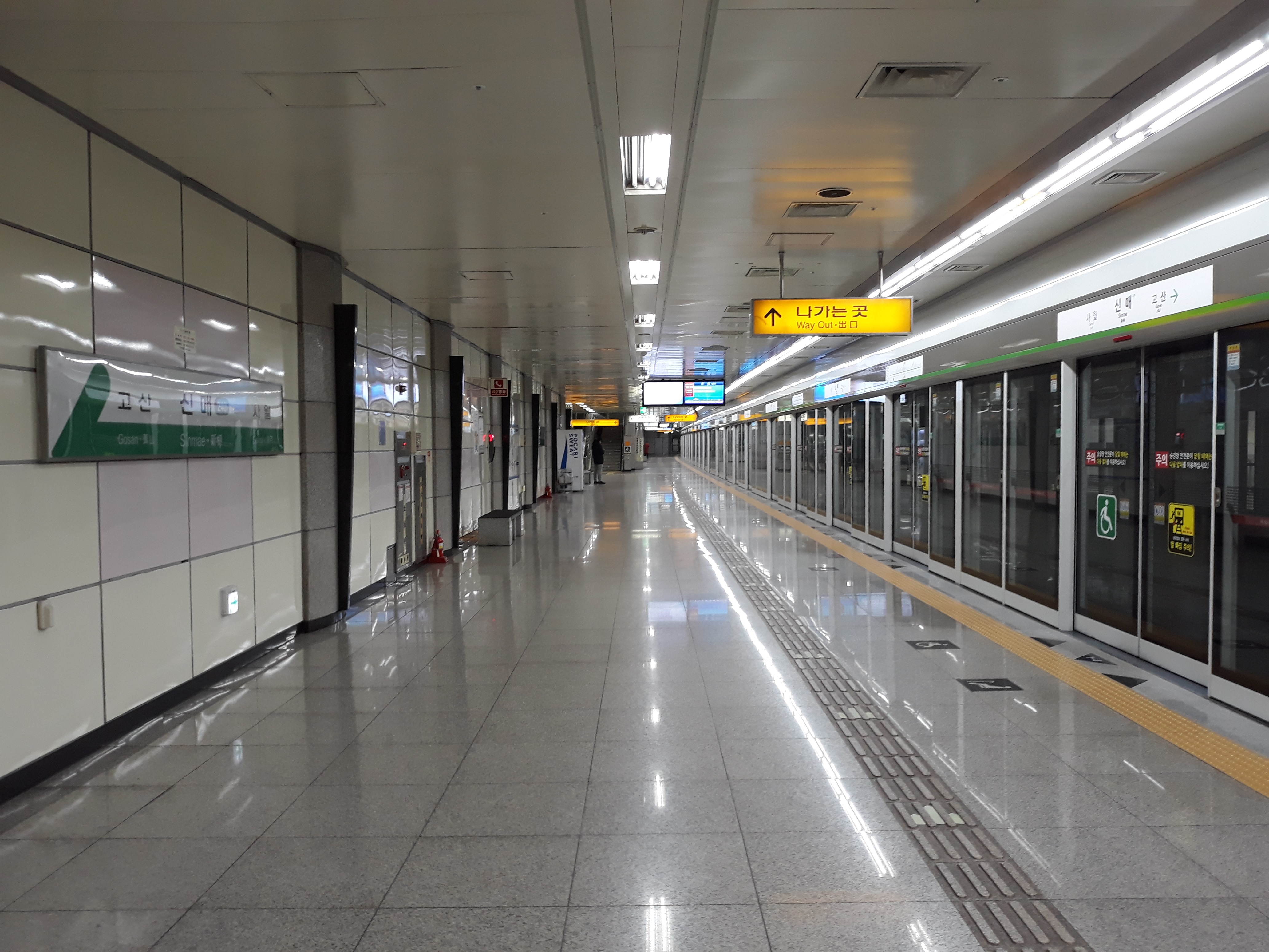 대구 도시철도 2호선 신매역 문양 방면 승강장